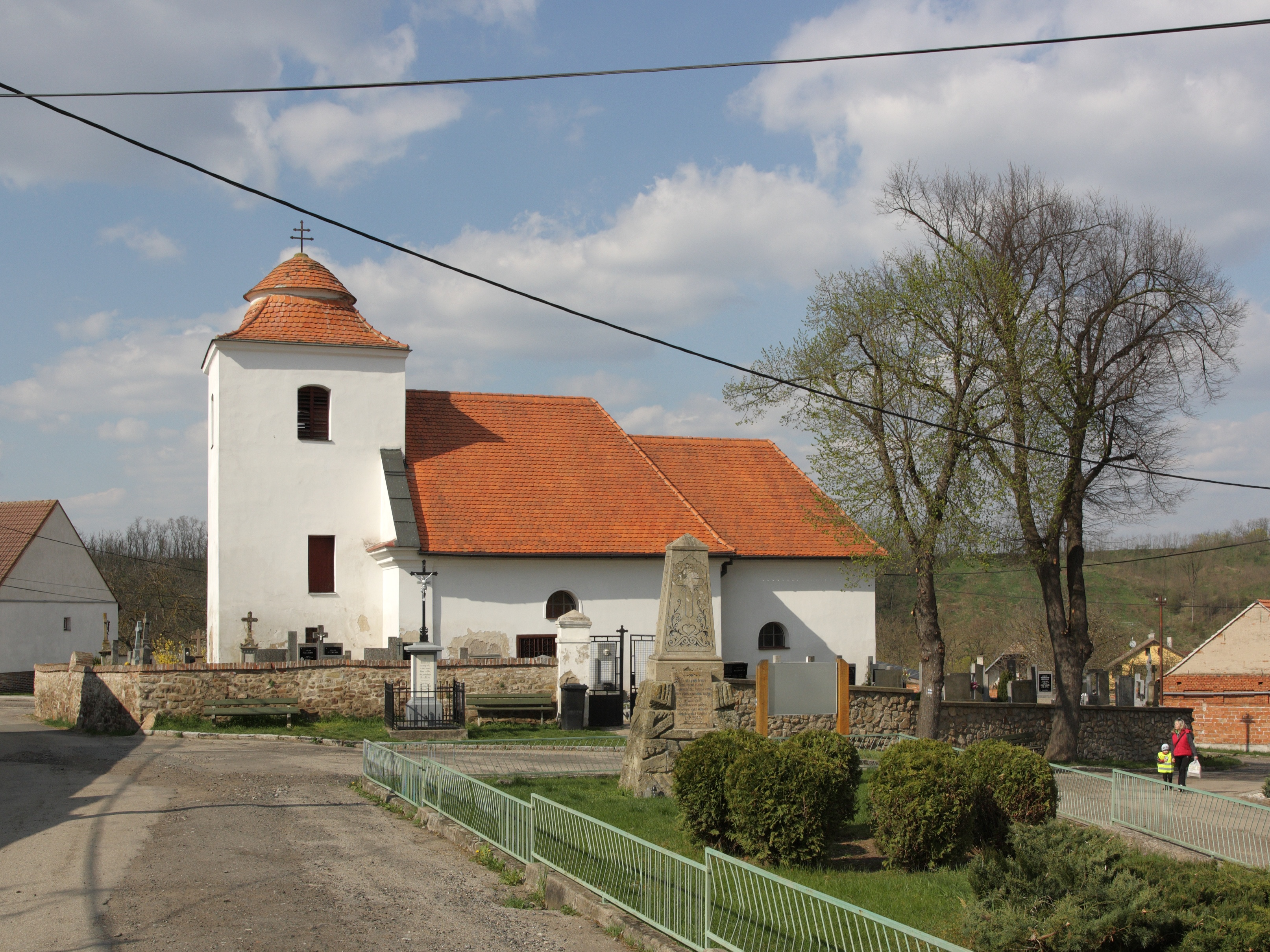 Rokytná (Moravský Krumlov) - kostel sv. Leopolda.